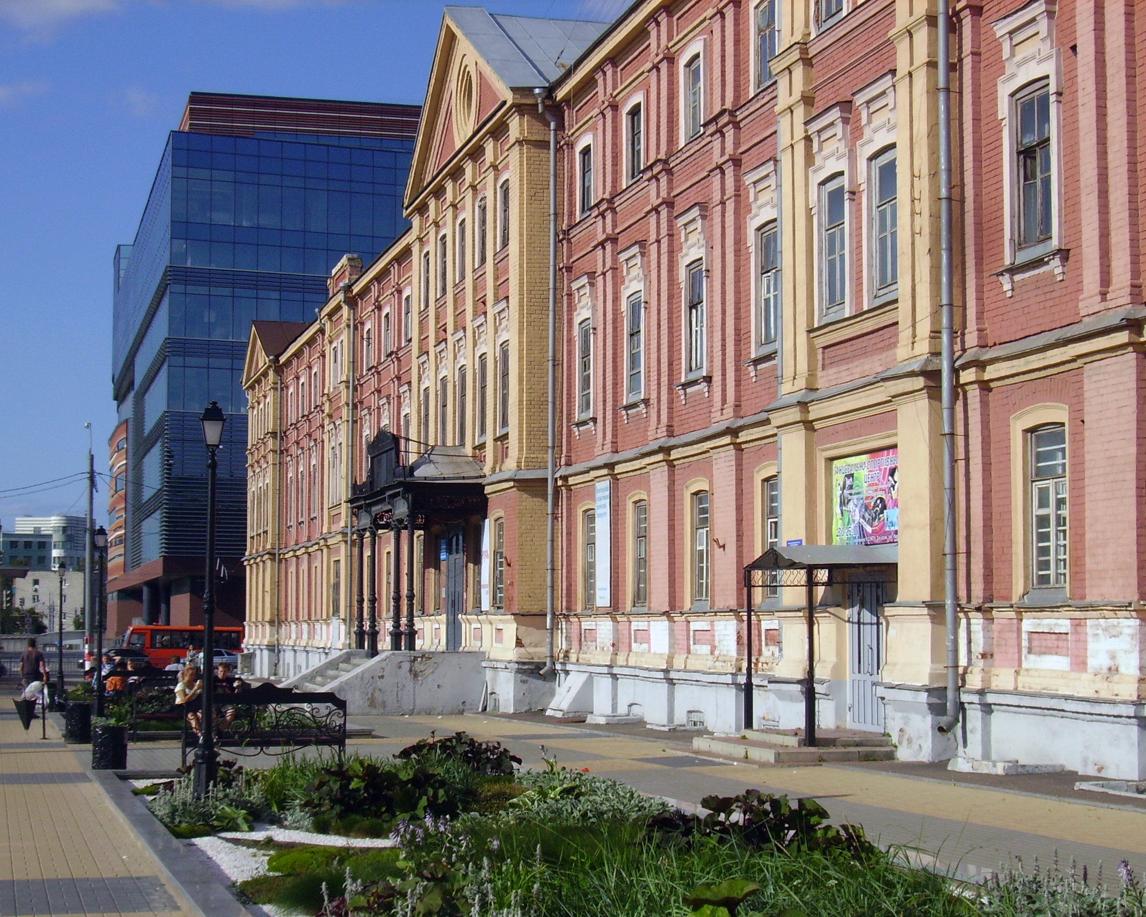 Здание городского общественного имени Блиновых и Бугровых Вдовьего дома: проспект Гагарина, 2, Нижний Новгород, Нижегородская область